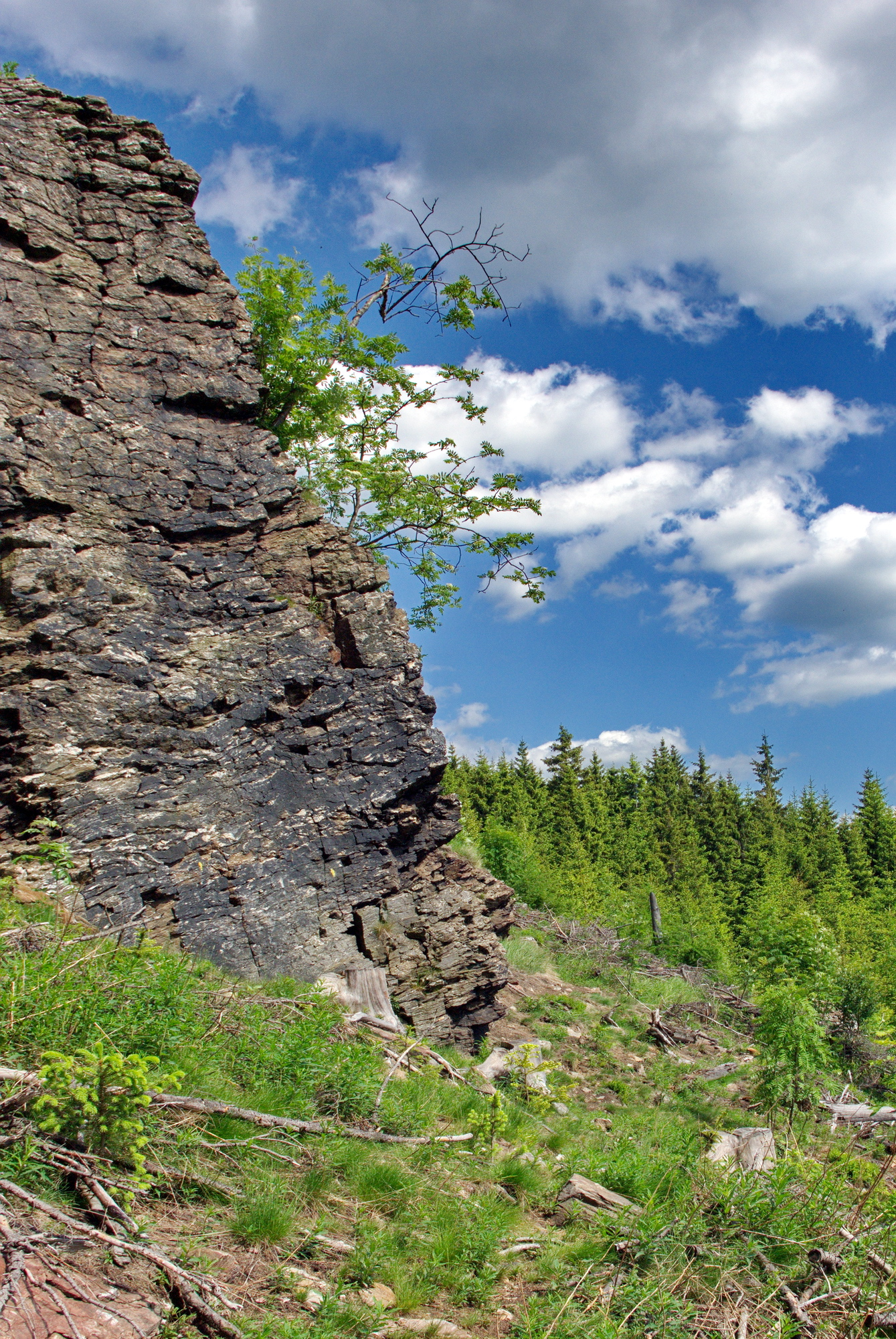 Horní Blatná, Krušné hory, skály Na Strašidlech (913 m), okres Karlovy Vary